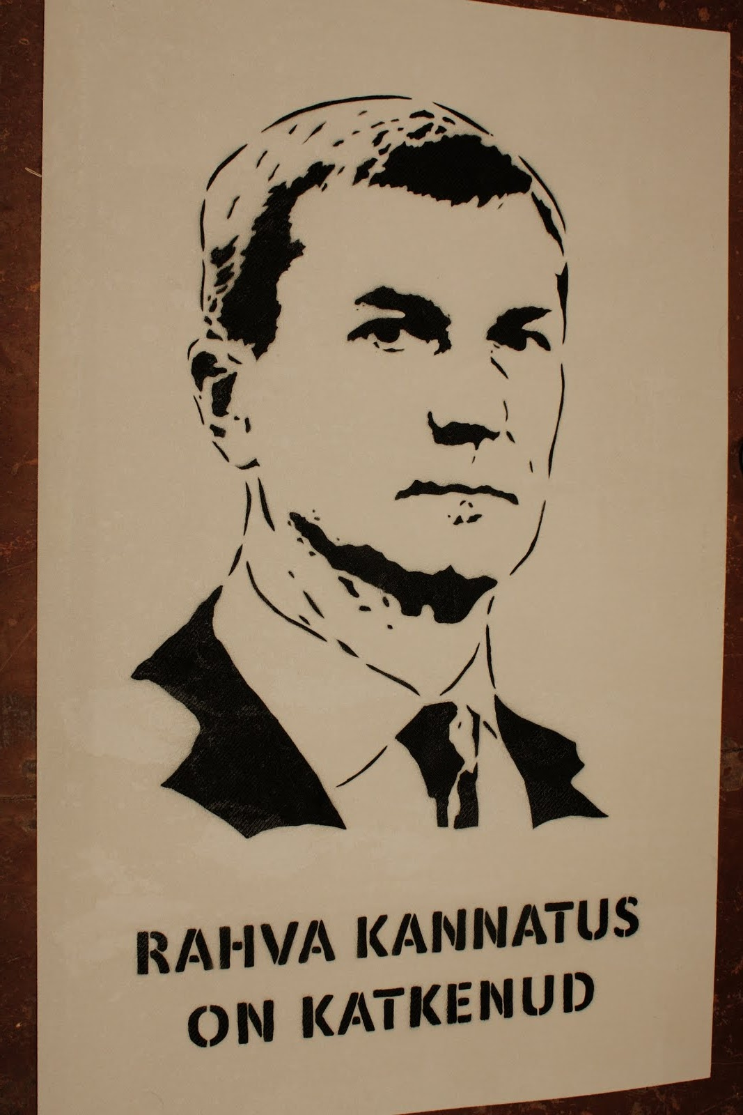 Plakat Andrus Ansipi pildiga ja kirjaga "Rahva kannatus on katkenud", valmistatud meeleavalduseks 13. novembril 2012.